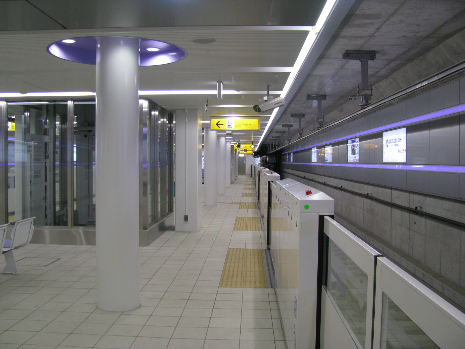 横浜市営地下鉄グリーンライン都筑ふれあいの丘駅